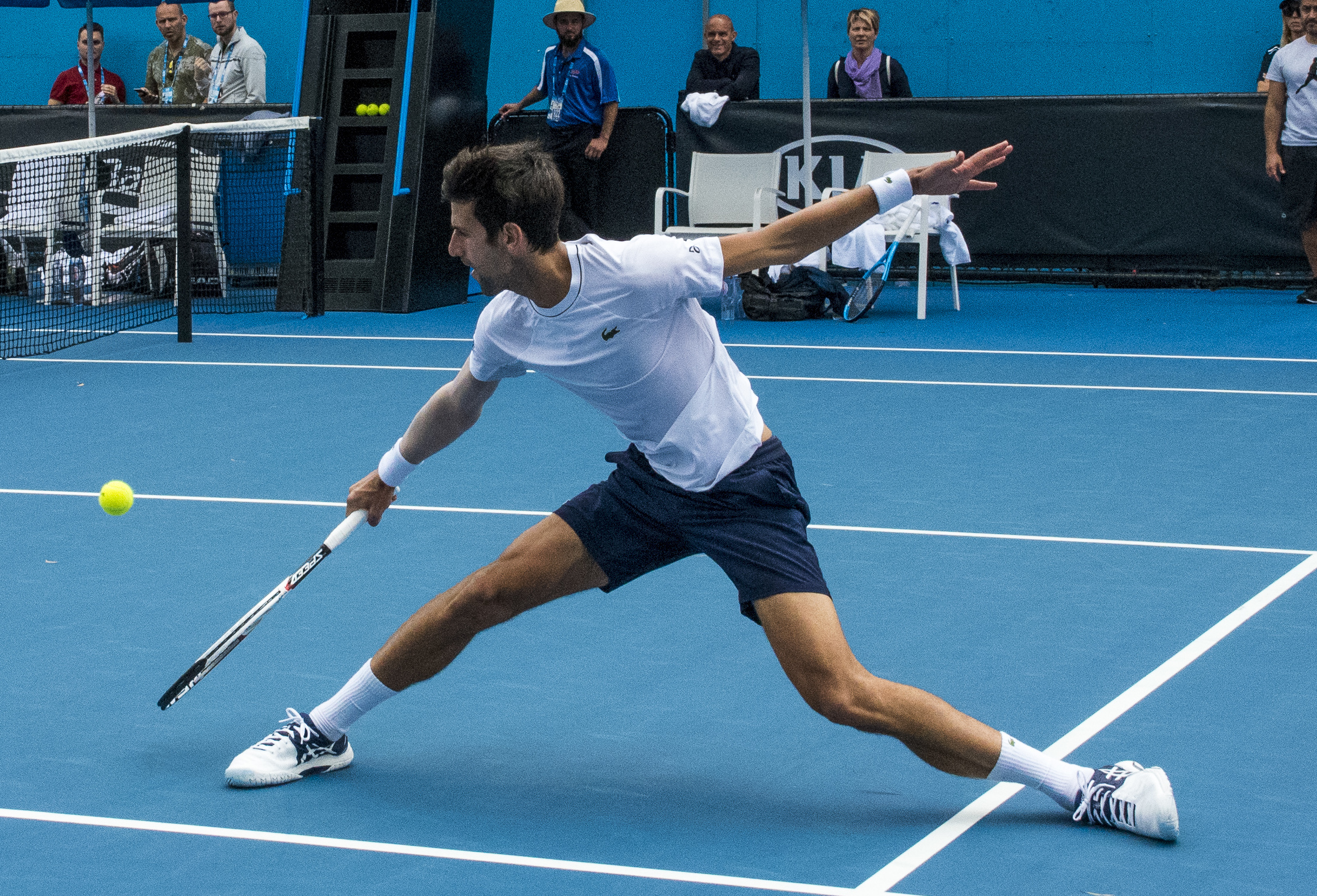 Novak Djokovic (Ser)